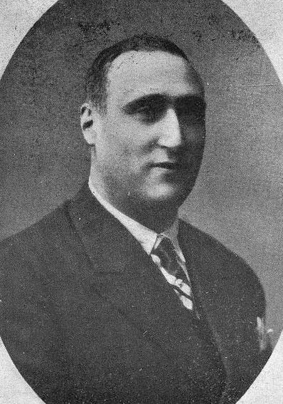 Fernando Villamarín Rodríguez, fotografía en Vida Gallega 1934